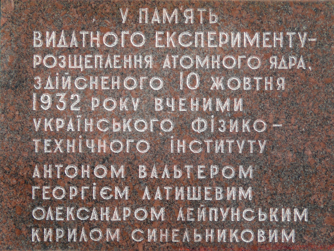 Надпись на памятнике в сквере перед главным корпусом Национального научного центра "Харьковский физико-технический институт" в Харькове.